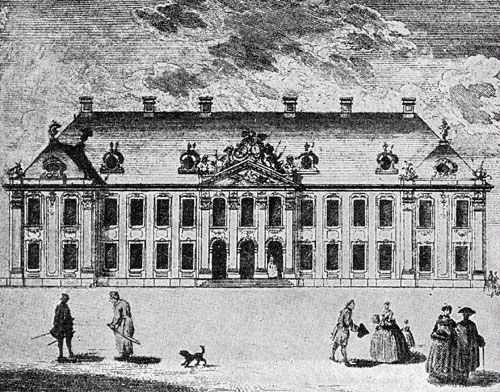 Potocki Palace in Warsaw.